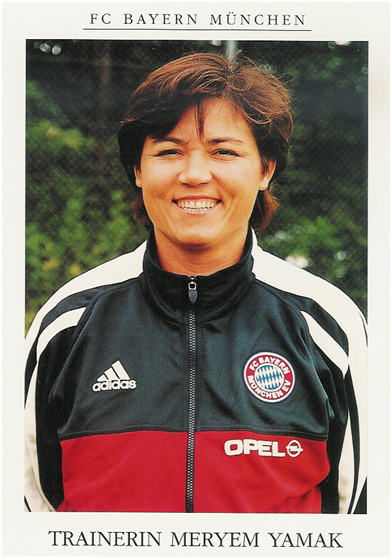 Meryem YAMAK